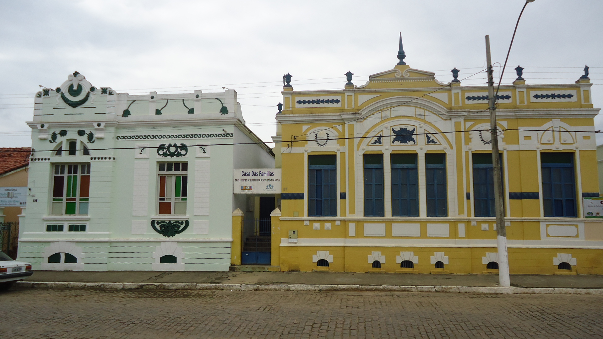 Centro Histórico da cidade de Pedra Azul tombado pelo IEPHA como patrimônio histórico